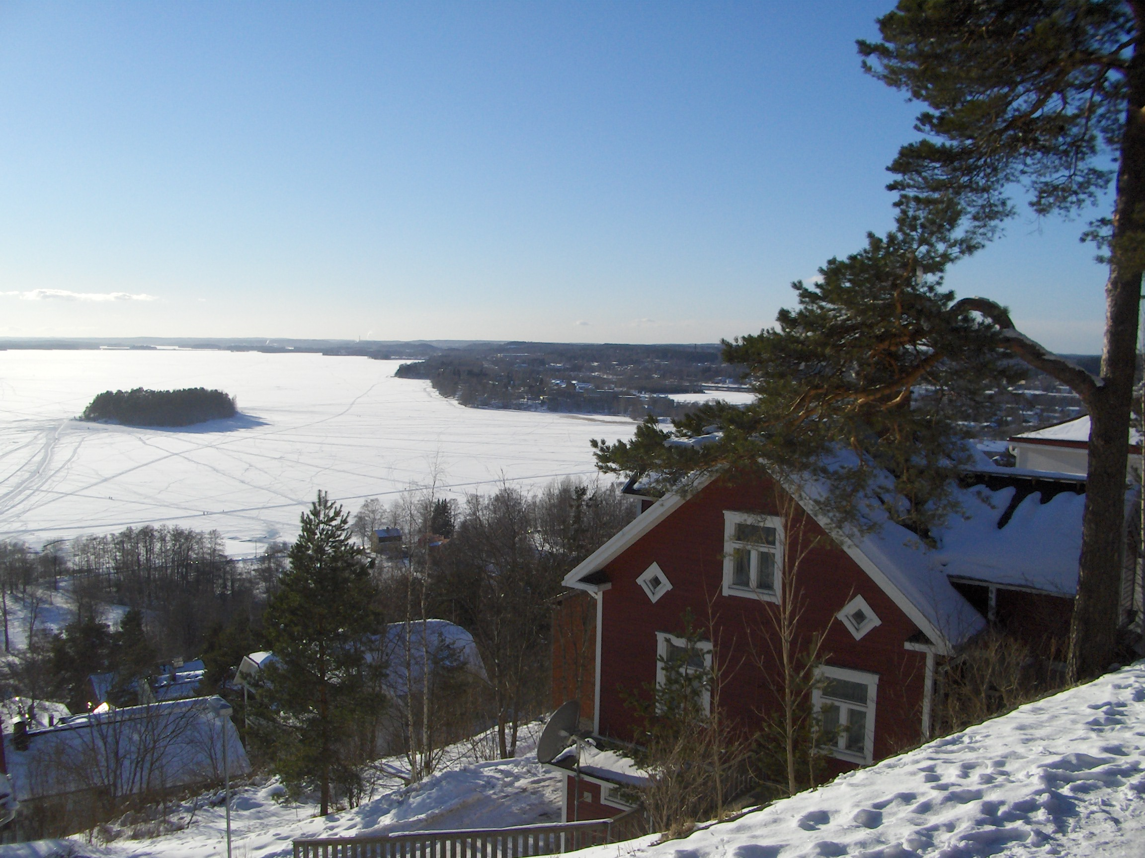 Pispala, a district in Tampere